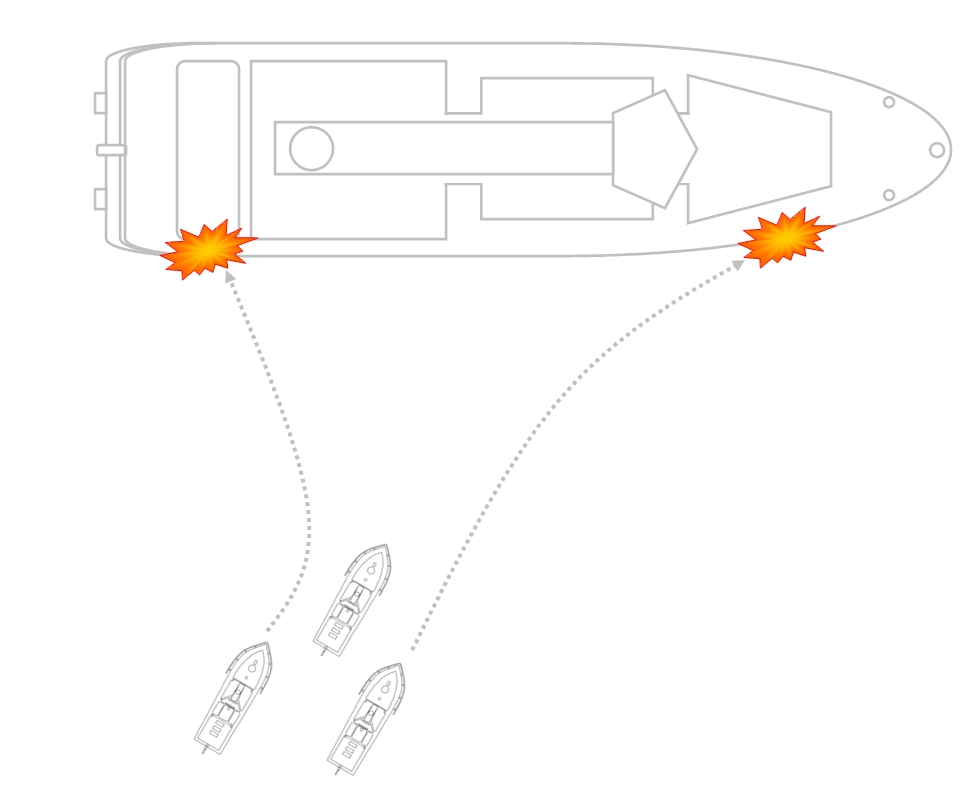 Eine Rotte Sprengboote des Typs Linse beim Zielangriff